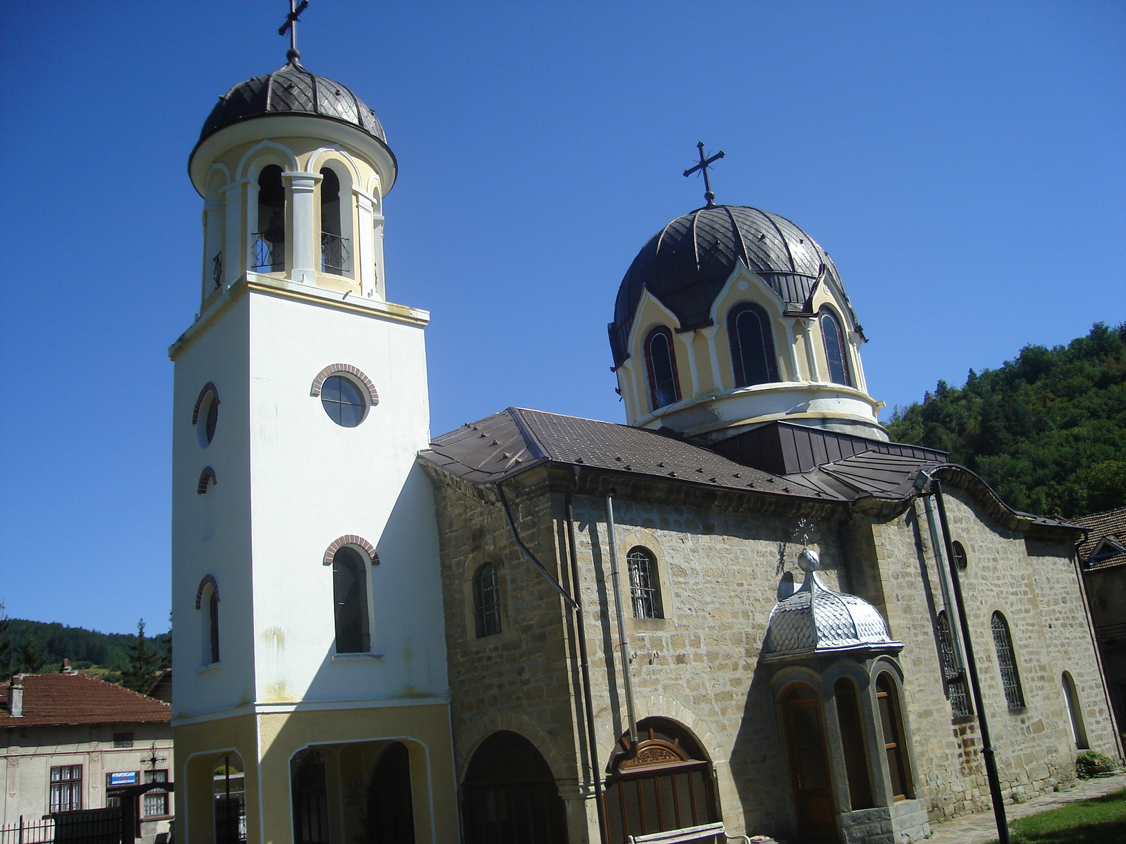 Църквата "Св. Пророк Илия" в град Плачковци